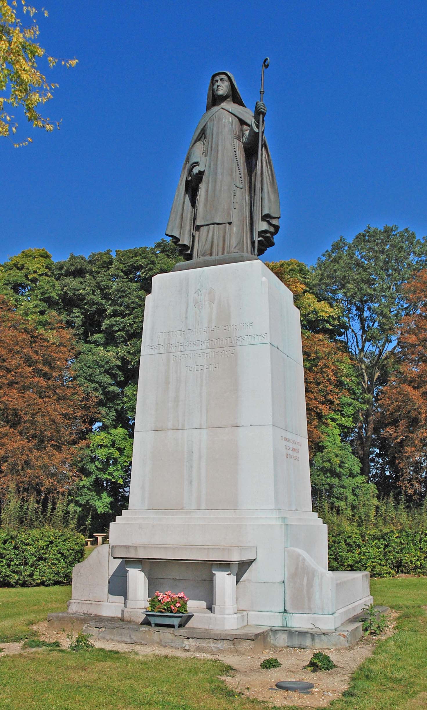 Standbeeld van de heilige Colette in Corbie, langs de weg tussen Corbie en Albert (Frankrijk)